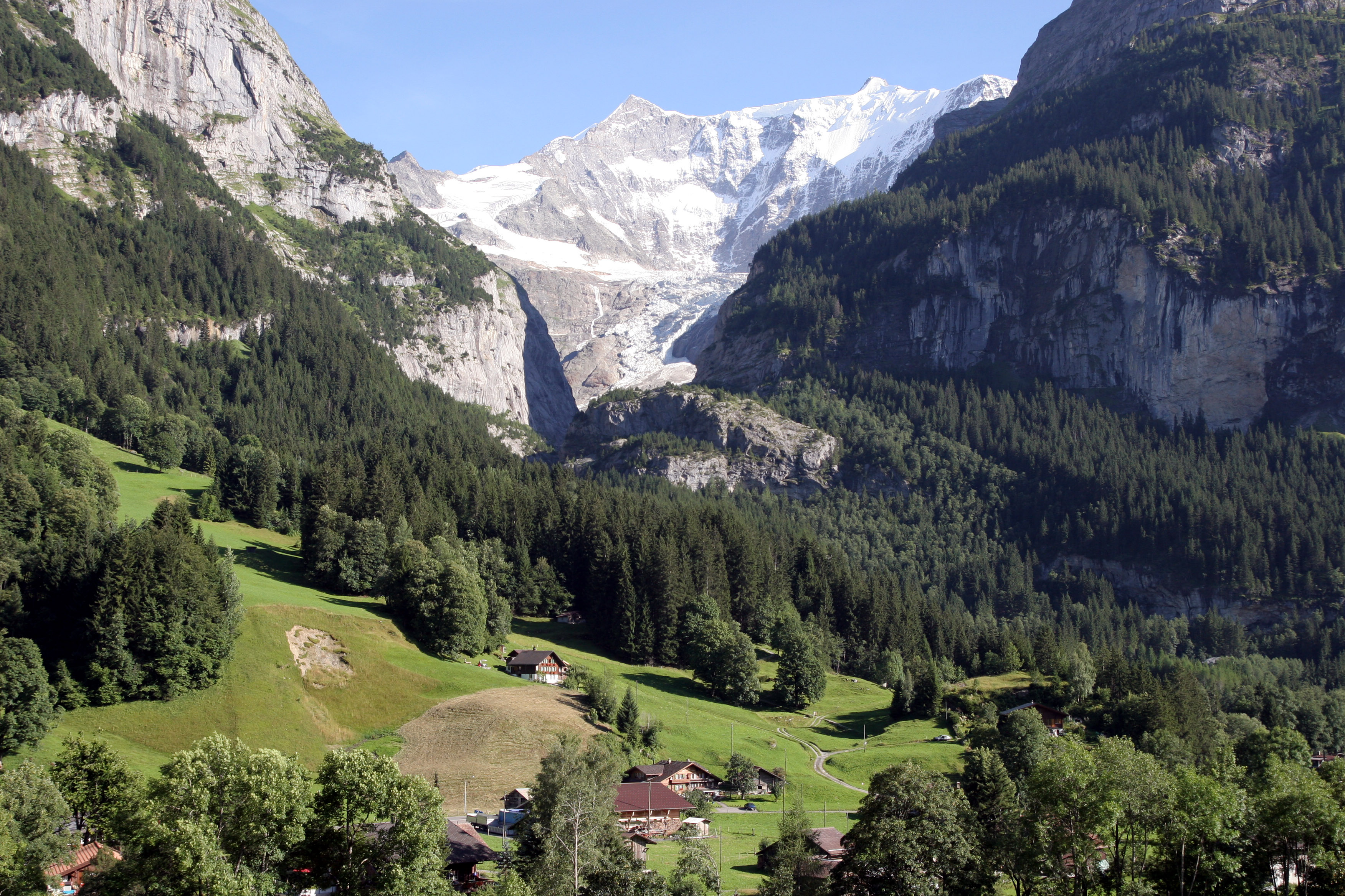 Das Gross Fiescherhorn (rechts) und Ochs (links) von Grindelwald (Friedhof) aus gesehen mit Unterem Grindelwaldgletscher